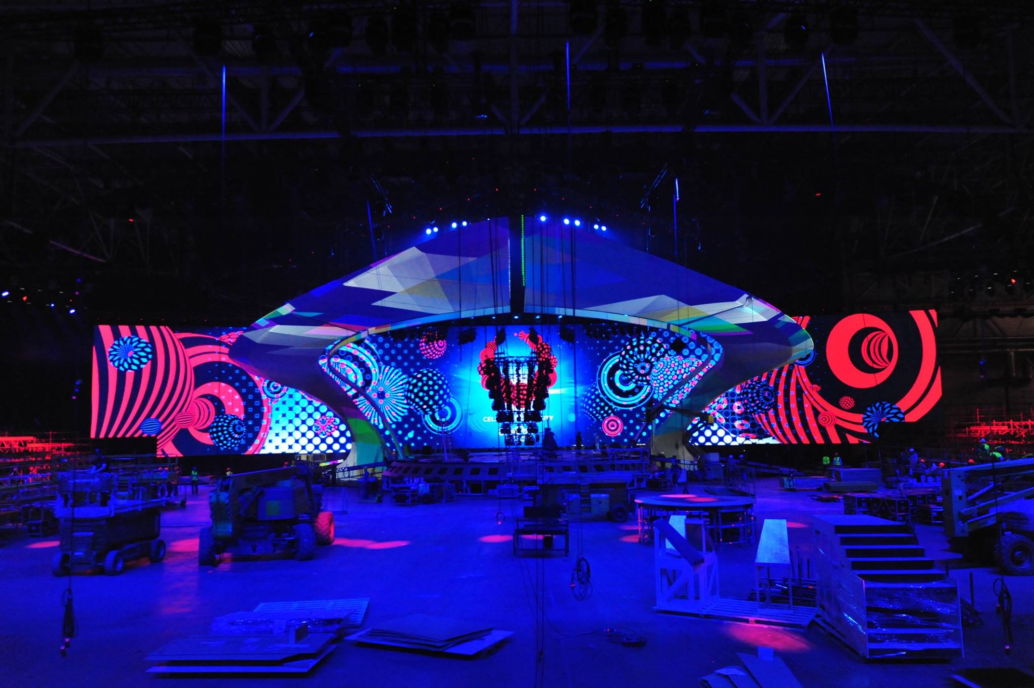 Это сцена Евровидения